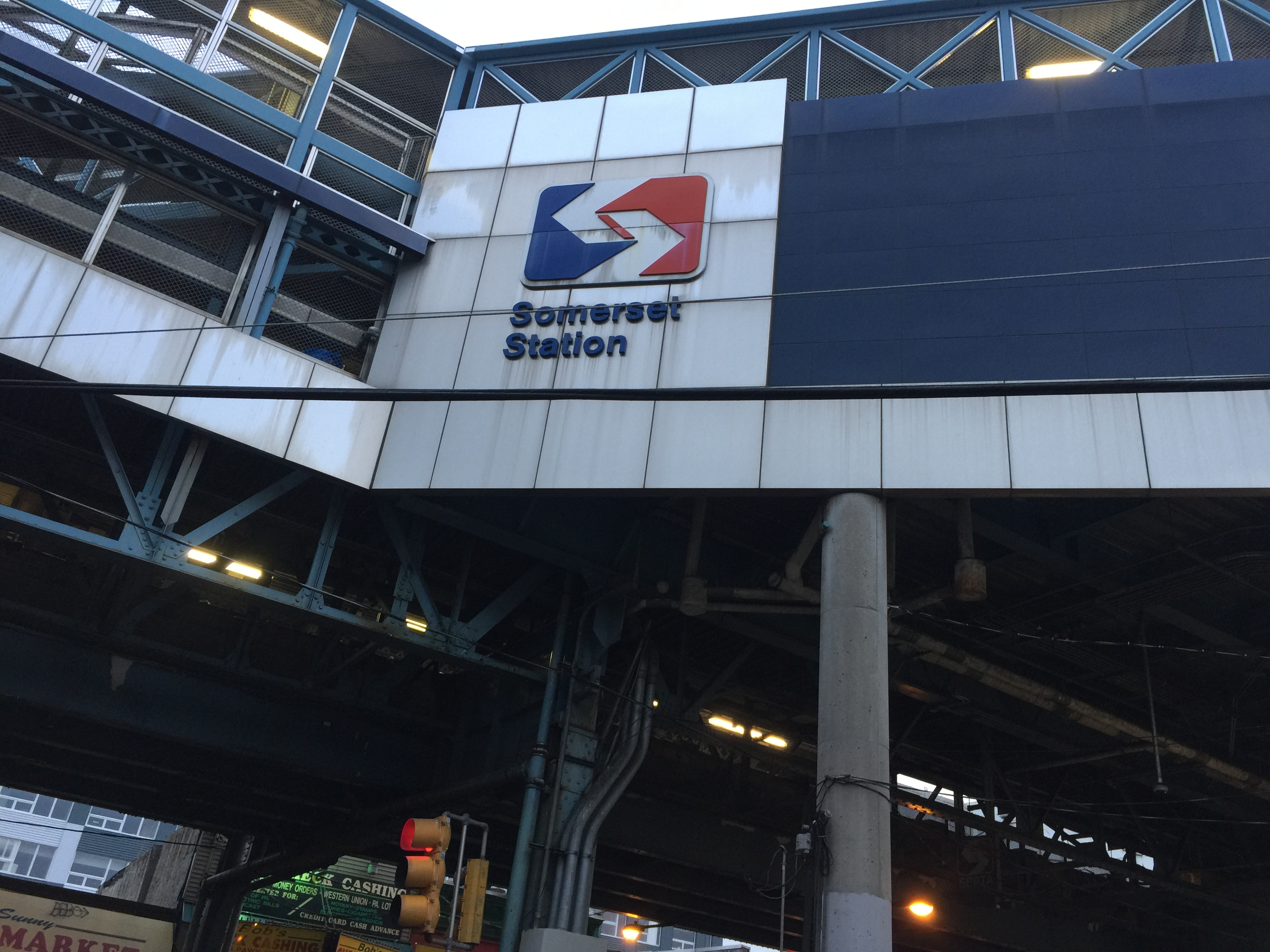 Somerset station